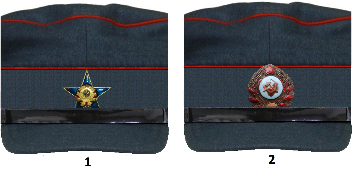 Фуражки милиции31